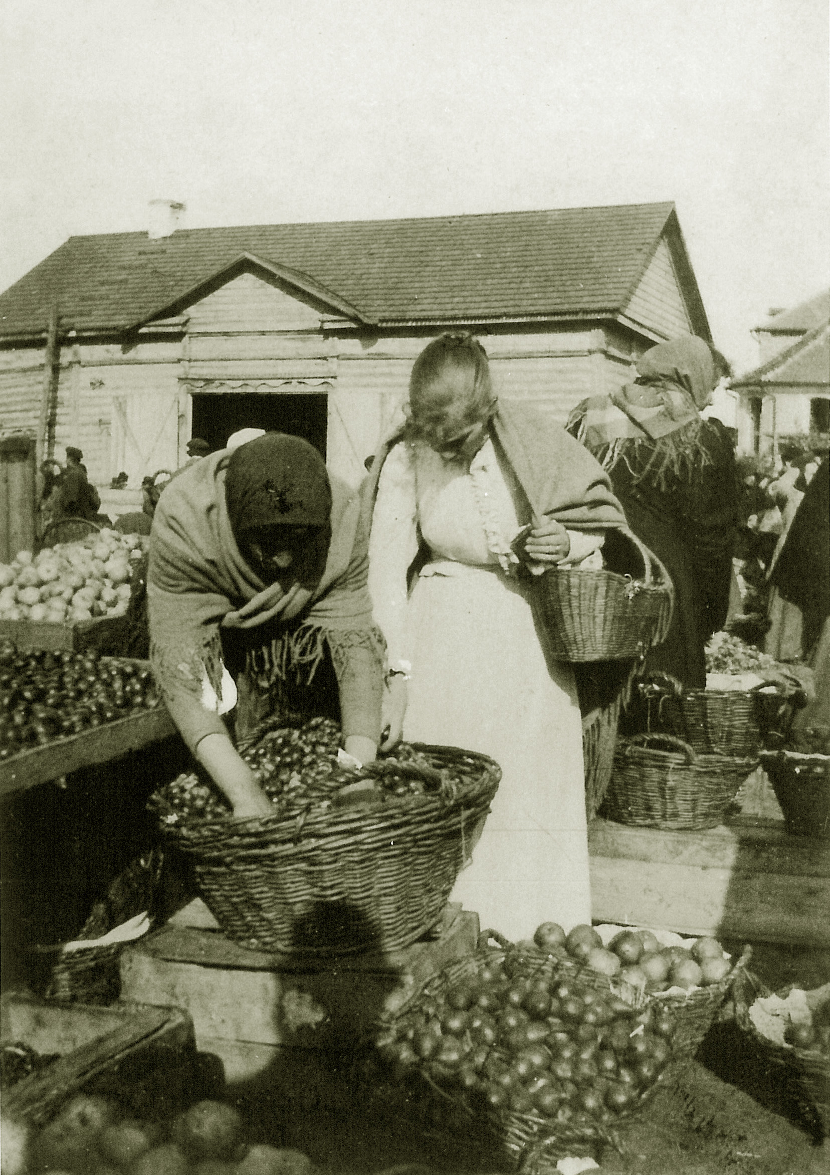 Prekyba vaisiais Vilniaus halės turgavietės apylinkėse.